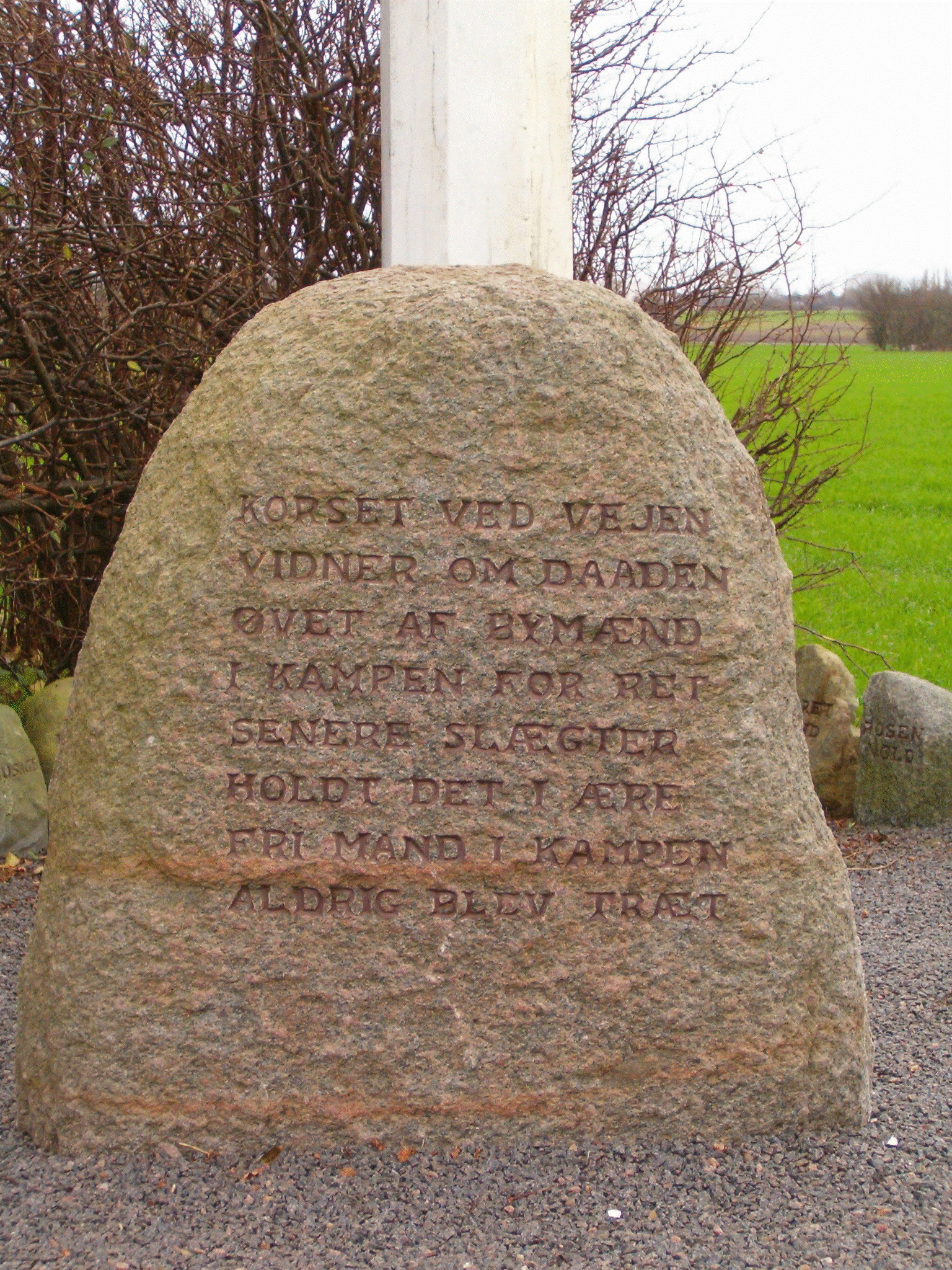 Inskription på sten under Skalkekorset i Frejlev - Lolland - Nystedegnen